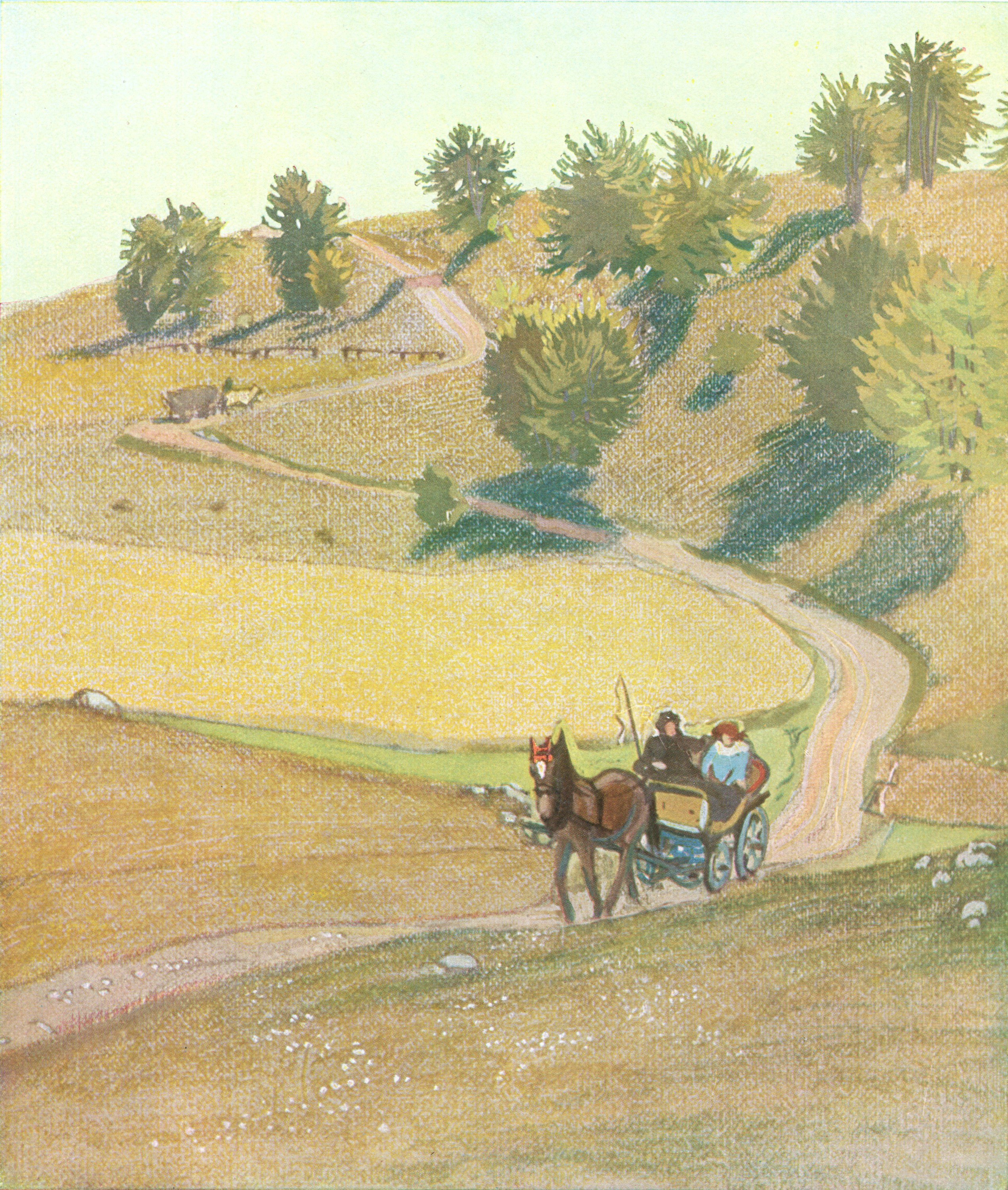 Auf dem Albhochland zwischen Feldstetten und Suppingen Aquarell von Karl Stirner